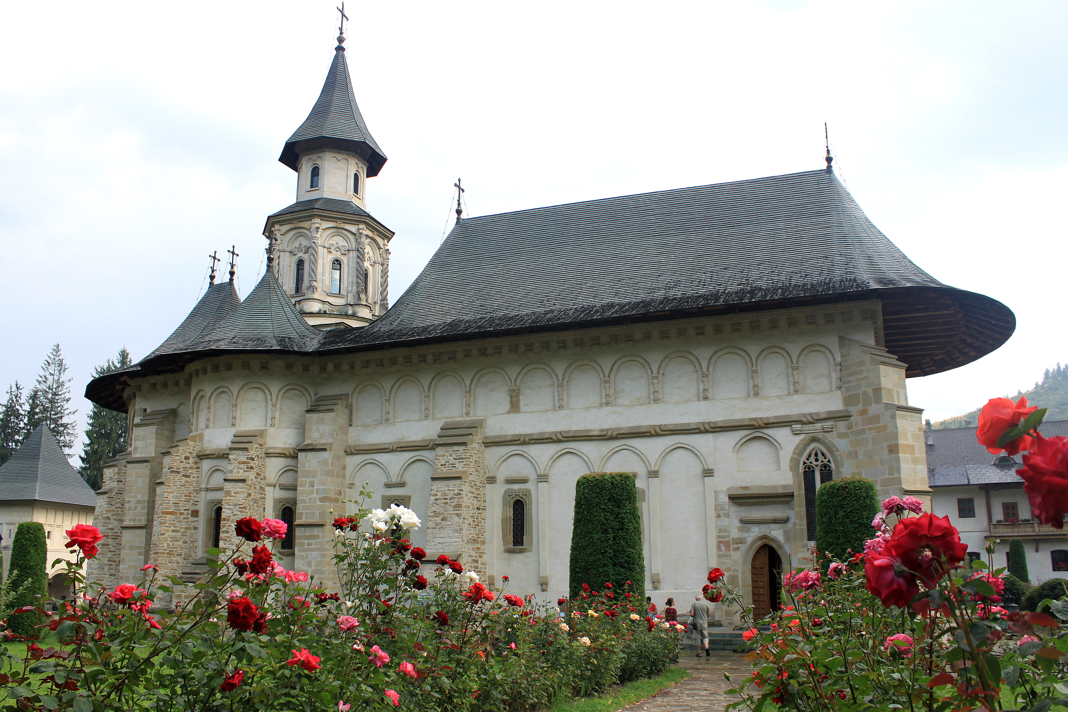 Prima ctitorie a Voievodului Ştefan cel Mare şi Sfânt, Mănăstirea Putna, cu hramul Adormirea Maicii Domnului, a fost sorocită loc de odihnă veşnică pentru domnitor şi familia sa. Zidirea a început la un an după cucerirea cetăţii Chilia în vara anului 1466. Lucrările de construcţie au durat patru ani, timp în care această măreaţă operă a fost dusă la bun sfârşit de arhitectul grec Teodor, ajutat de meşterii zidari, pietrari, zugravi şi argintari veniţi din Transilvania.